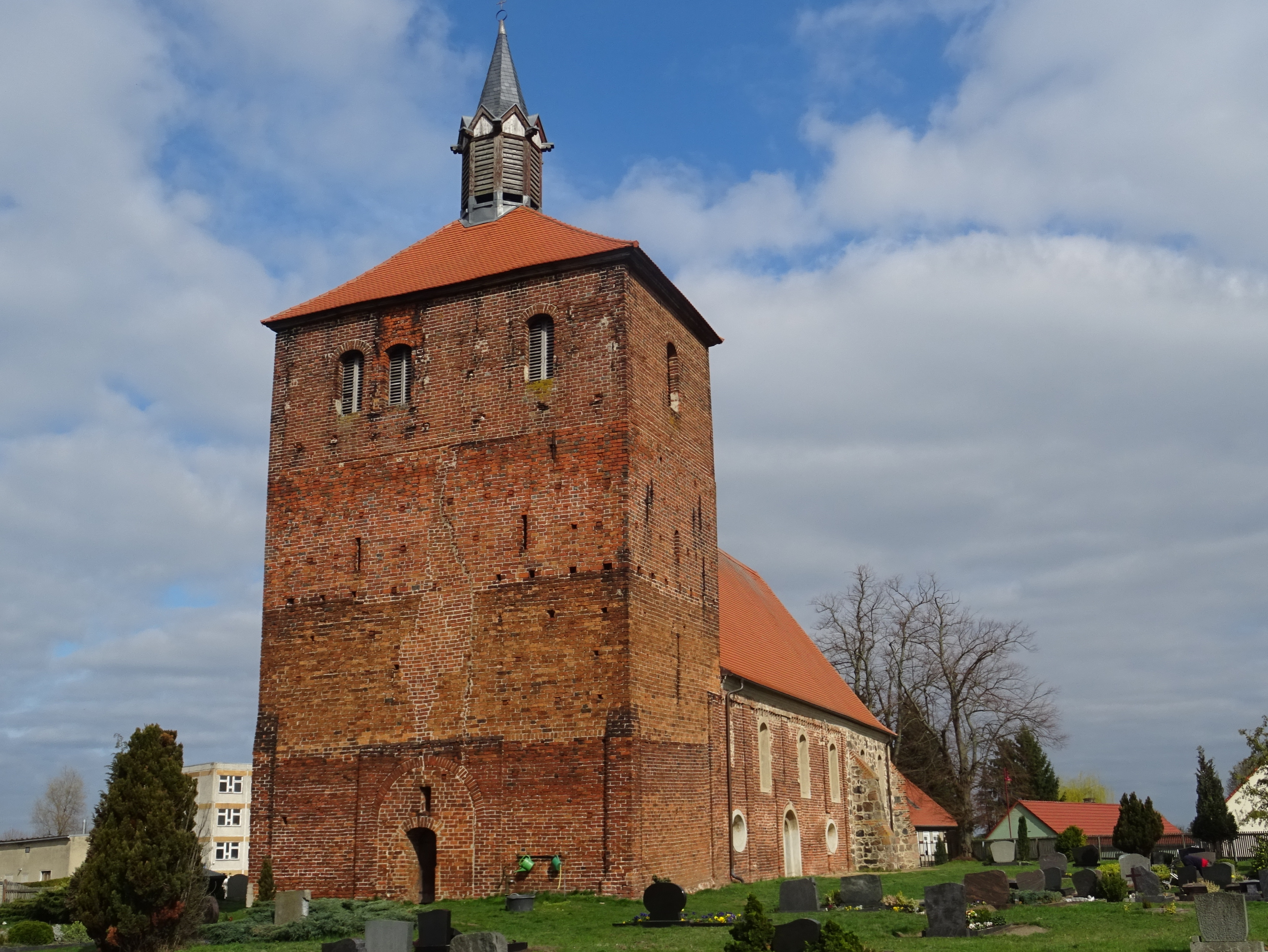 Schönberg, Stadt Seehausen (Altmark), Dorfkirche von Südwesten